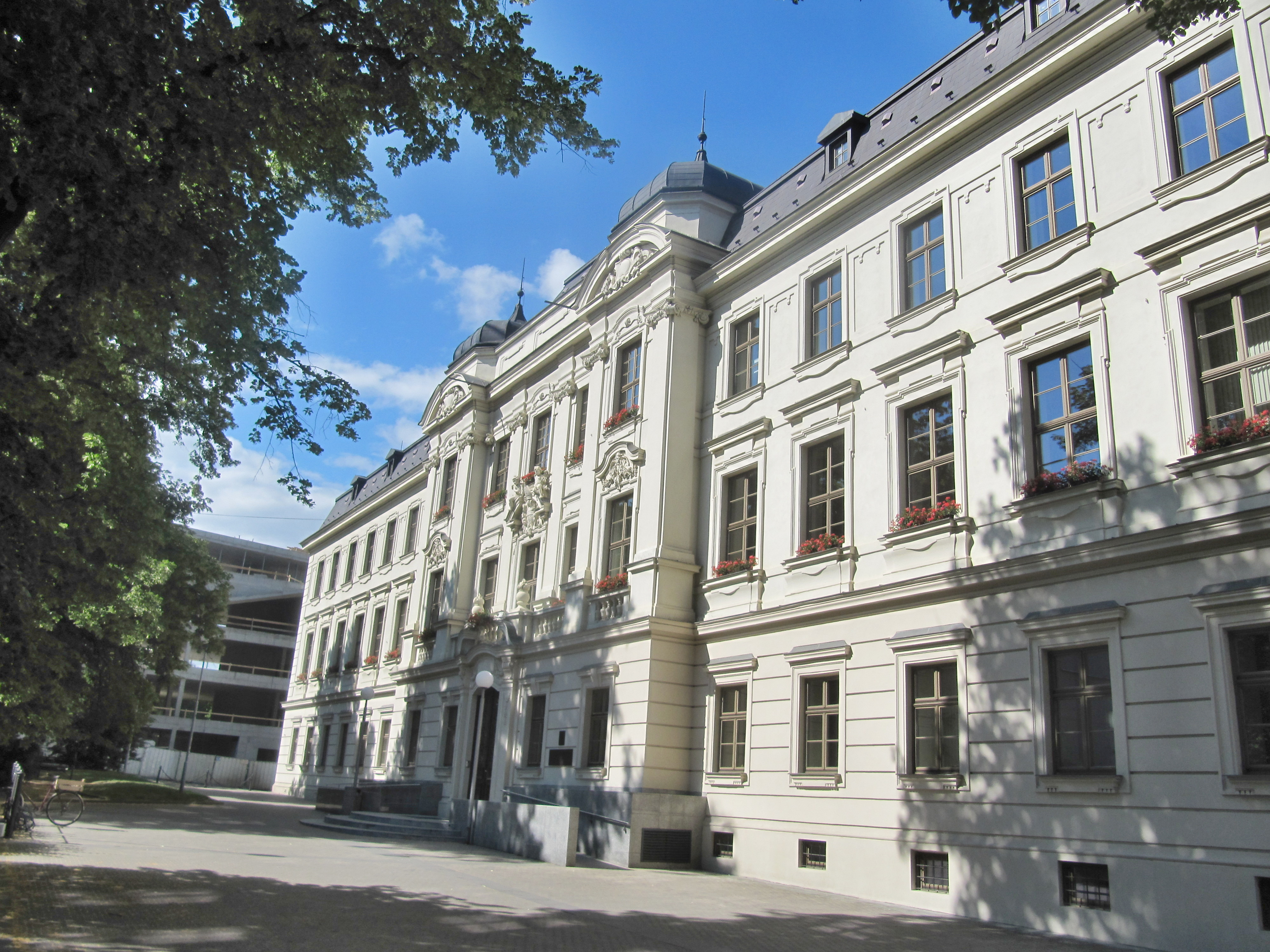 Rektorát VUT, Antonínská 548/1, Smetanova 548/16, Veveří (část Brna).